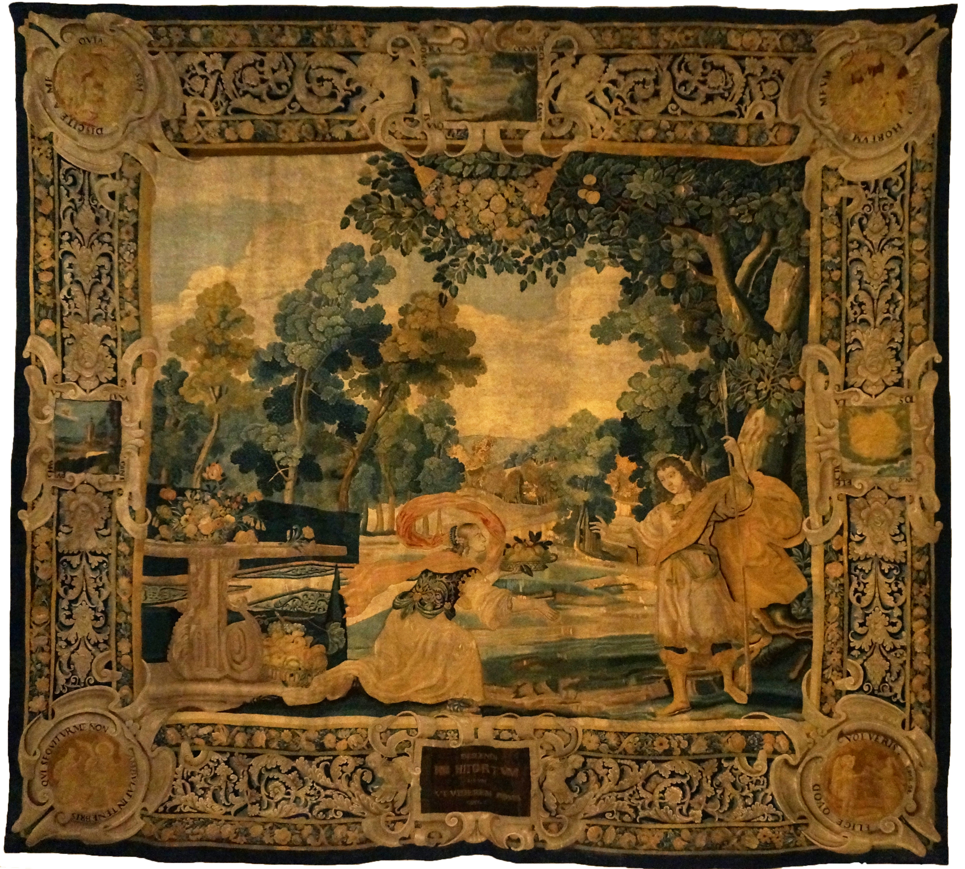 Fabrication française de la fin du XVIIe siècle, provient du château d'Hauteville dans l'Aisne. Sur le thème du Cantique des cantiques.